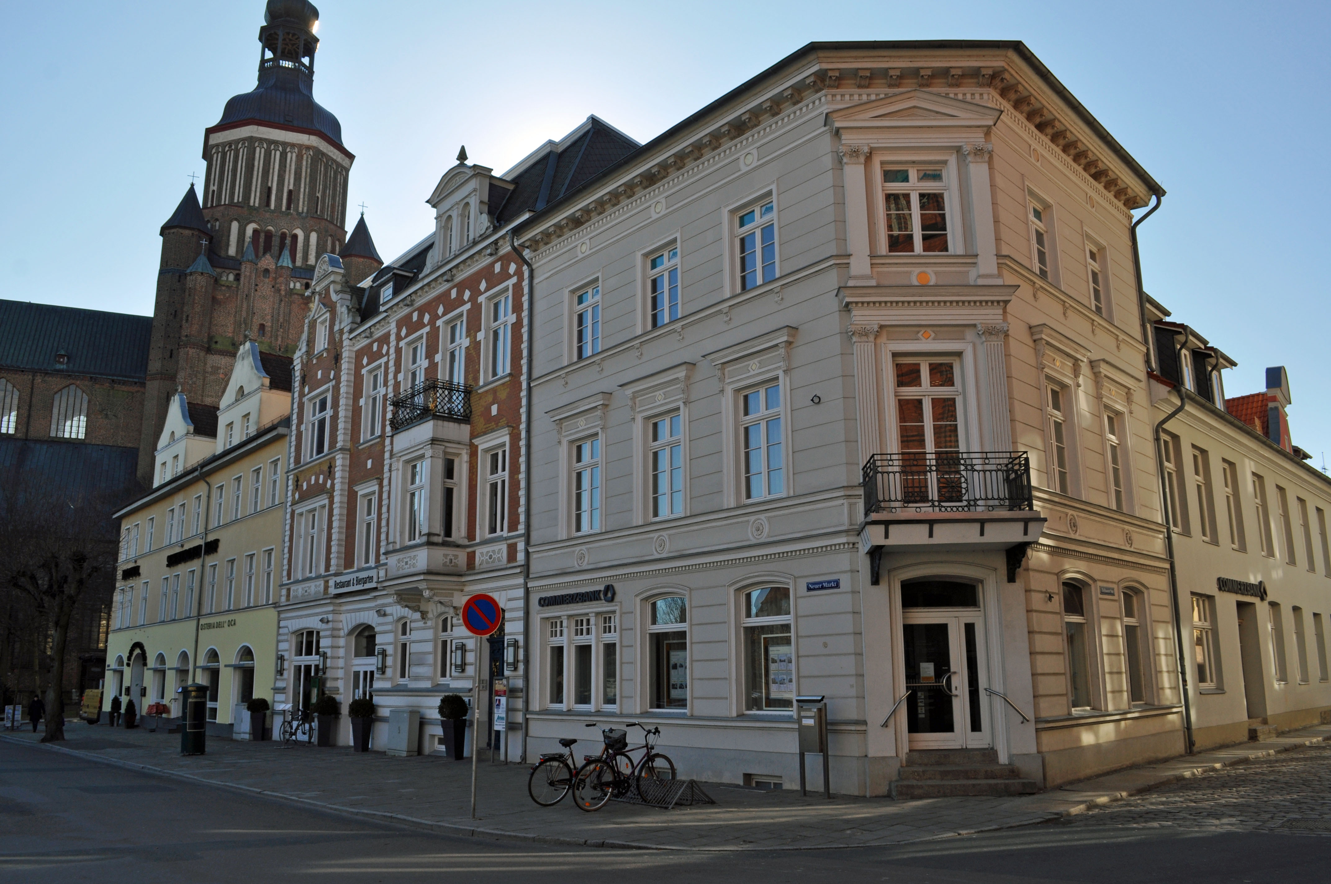 Gebäude bzw. Gebäudedetail in Stralsund. Straße und Hausnummer siehe Dateiname. Das Gebäude ist als Baudenkmal ausgewiesen, siehe dazu die Liste der Baudenkmale in Stralsund.